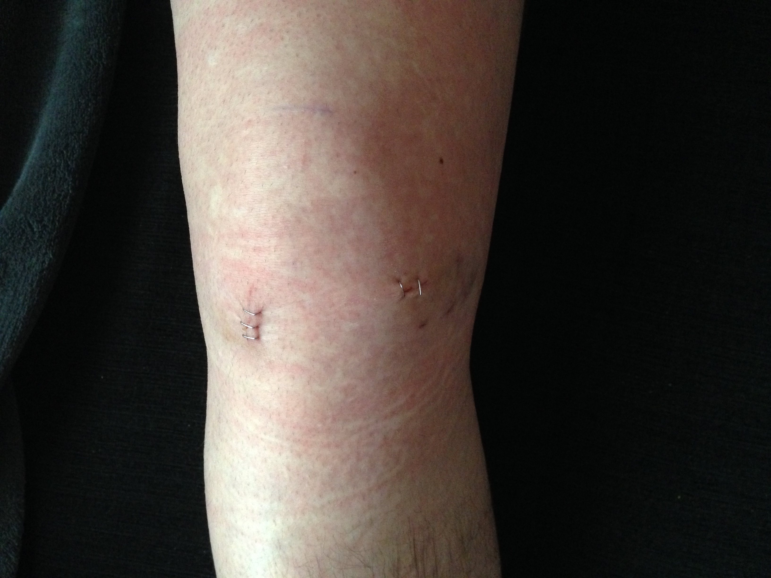 Cicatrices con grapas tras una artroscopia de rodilla.